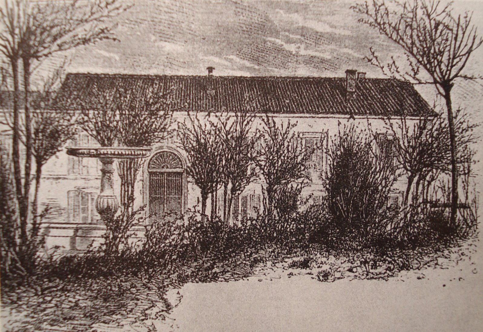 Año 1867. Grabado de la casa de la Quinta del Sordo donde Goya creó sus pinturas negras.